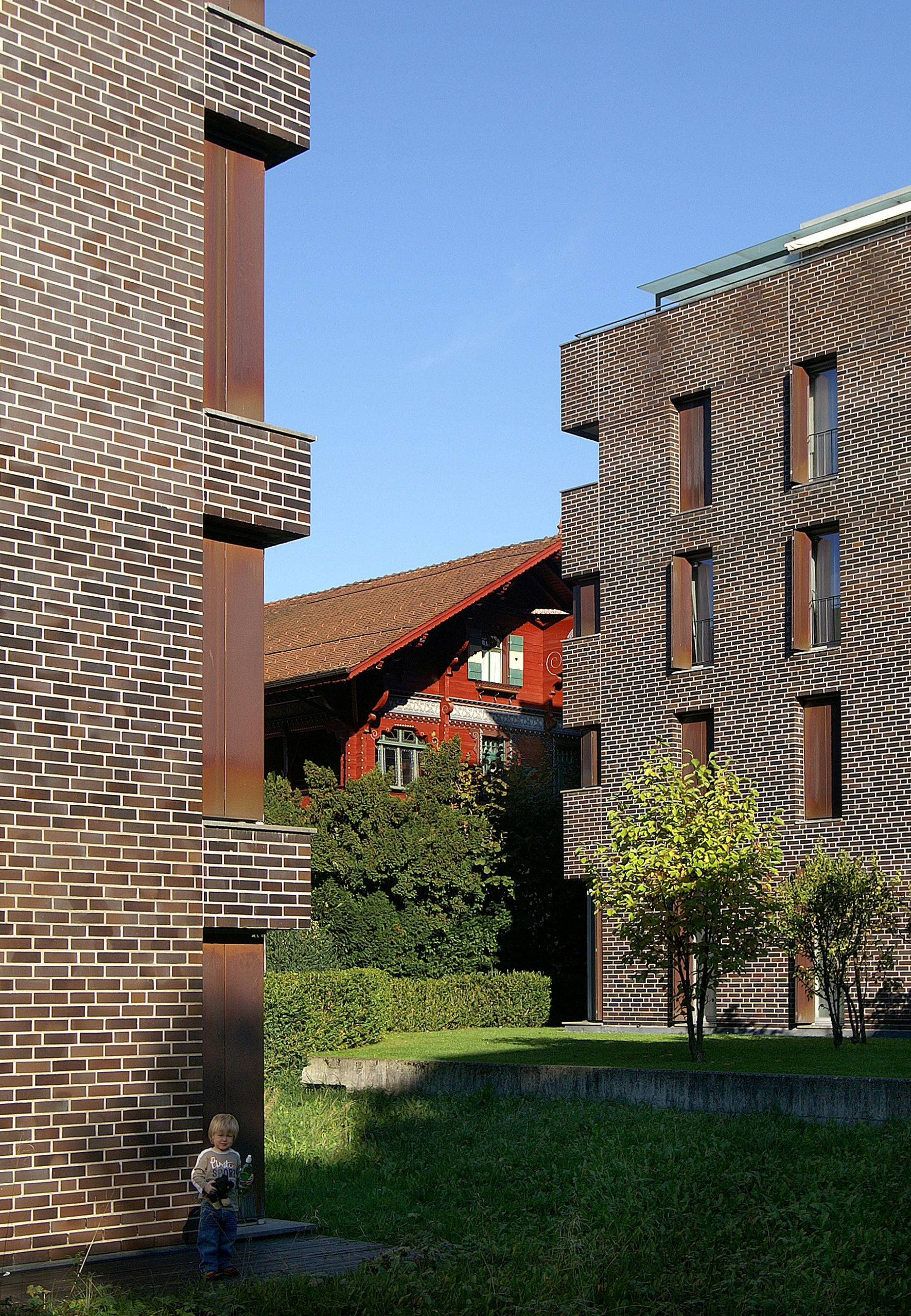 Zwischen Backsteinmauerwerk den Gebäuden in der Mozartstraße 5 und 5a von Baumschlager Eberle liegt dazwischen beschrieben aus dem DEHIO Vorarlberg 1983: die Mozartstraße Nr.7: Landhausartig, erbaut um 1900; Kreuzgiebel, Balkenstrickwerk über Bruchsteinsockel, Dachuntersicht mit reicher Schnitzerei, Stiegenhausbereich (Fenster, Gitter, Stuck) in Jugendstil. In Dornbirn, Bezirk Markt .